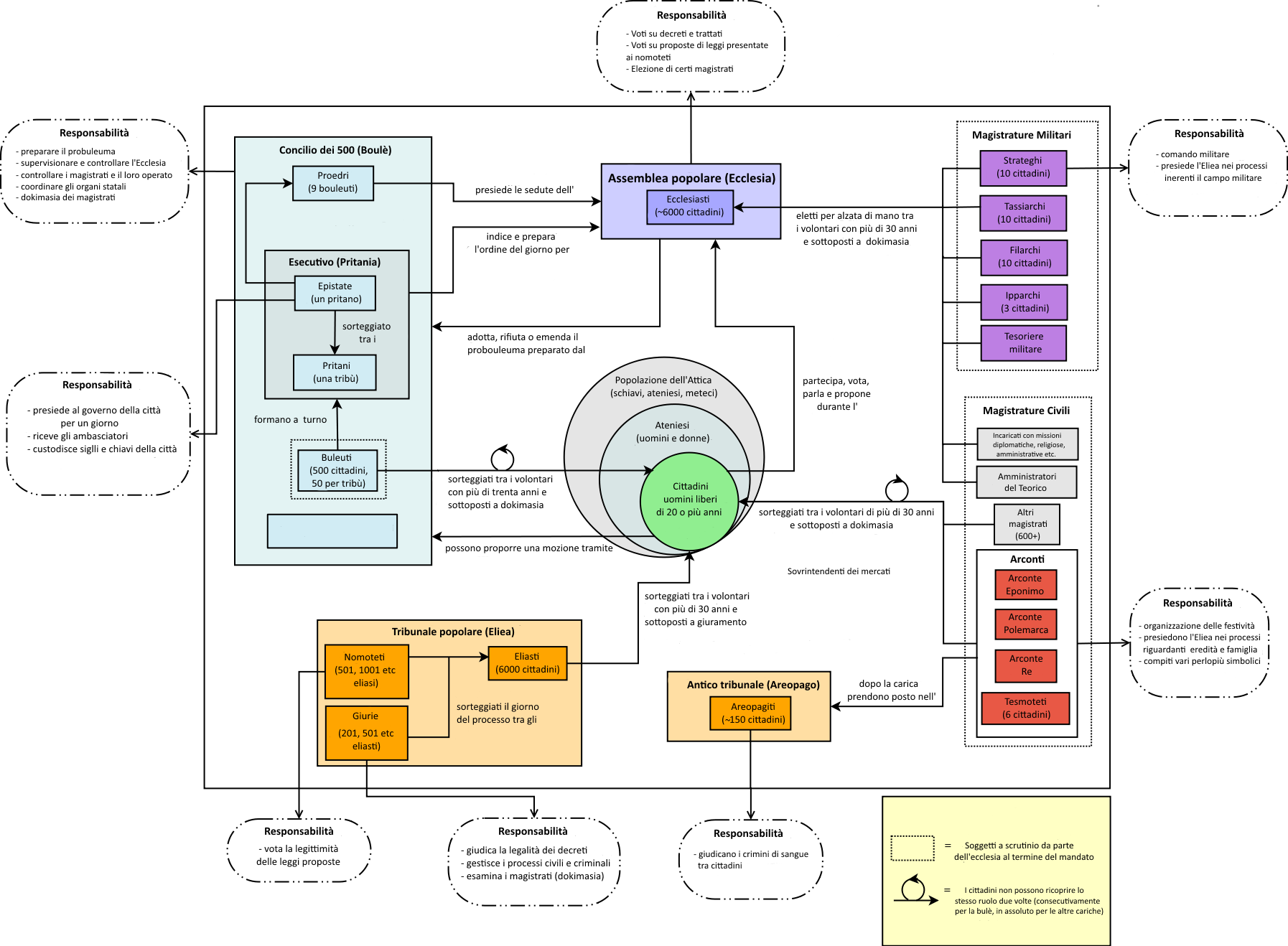 Traduzione di un diagramma che descrive la costituzione ateniese all'epoca dell' Athenaion politeia.